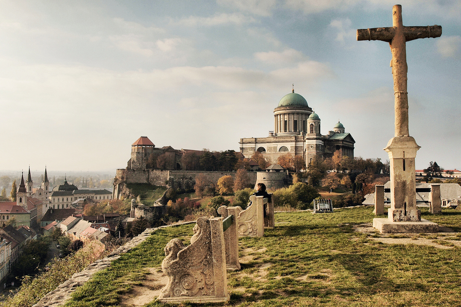 Főszékesegyház (Esztergom, Szent István tér) This is a photo of a monument in Hungary, Identifier: 6238